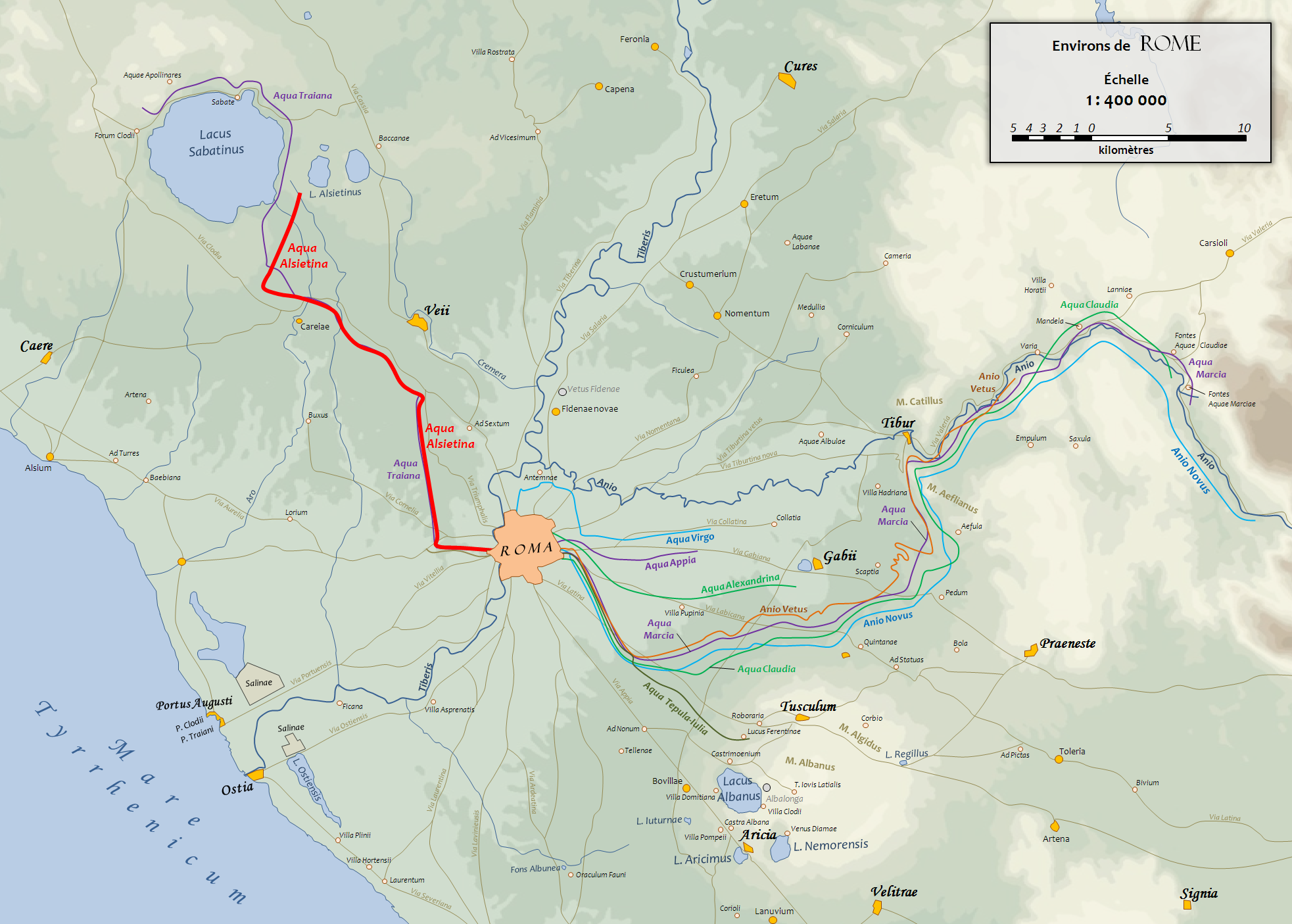 Carte du Latium antique sur lequel figure le tracé des aqueducs de Rome. D'après un fond de carte de 1886 (G. Droysens Allgemeiner Historischer Handatlas).